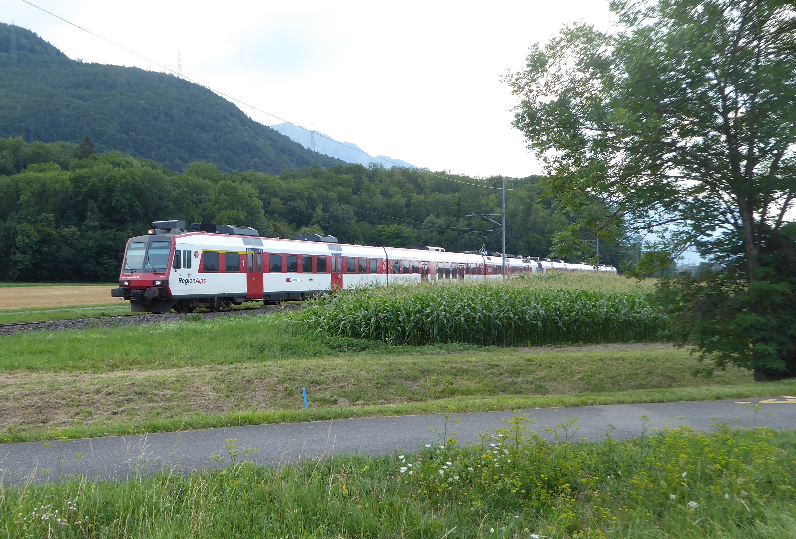 Domino der Regionalps zwischen der Dienststation Les Paluds und Massongex